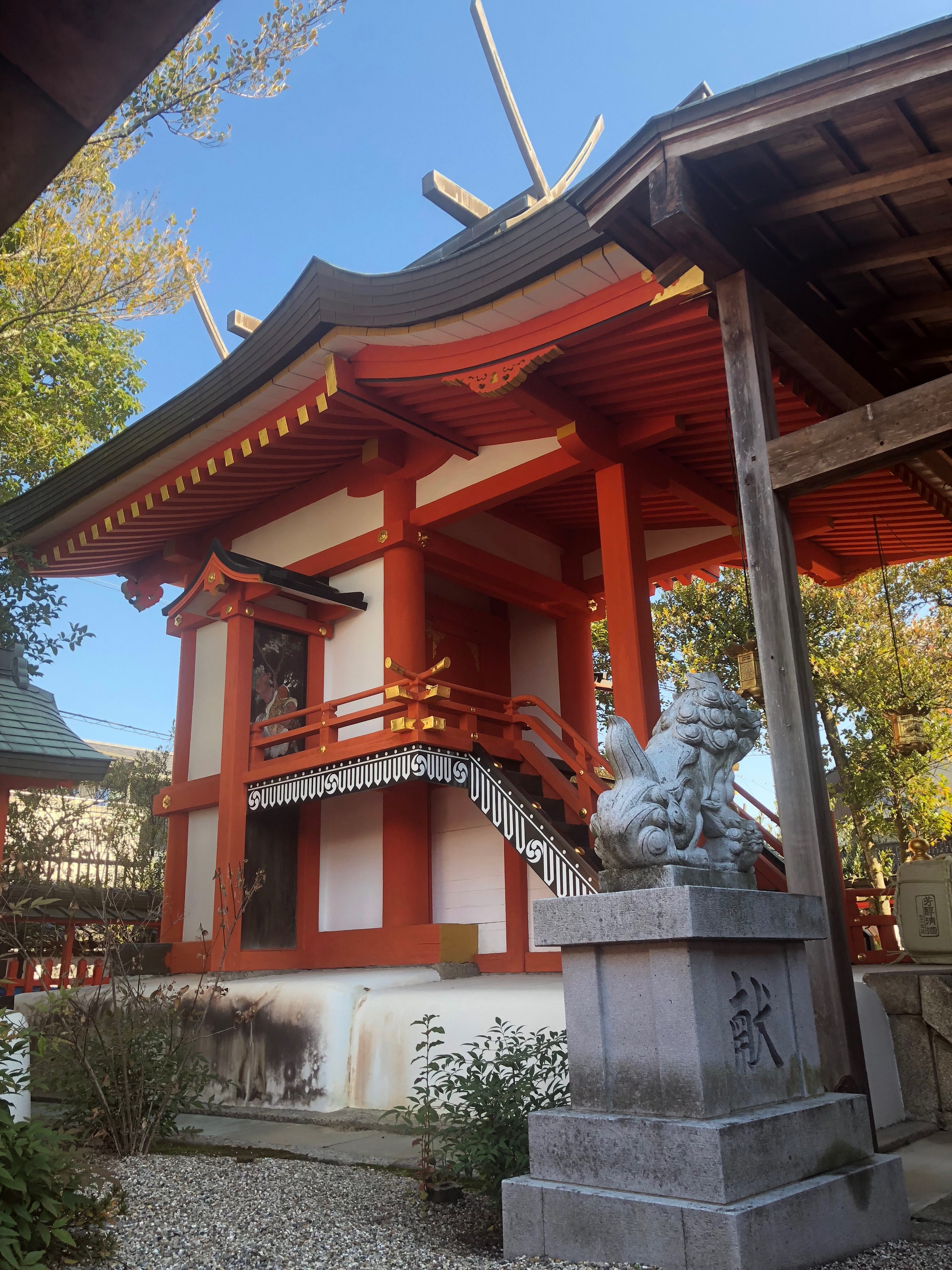 御霊神社（奈良市薬師堂町）本殿